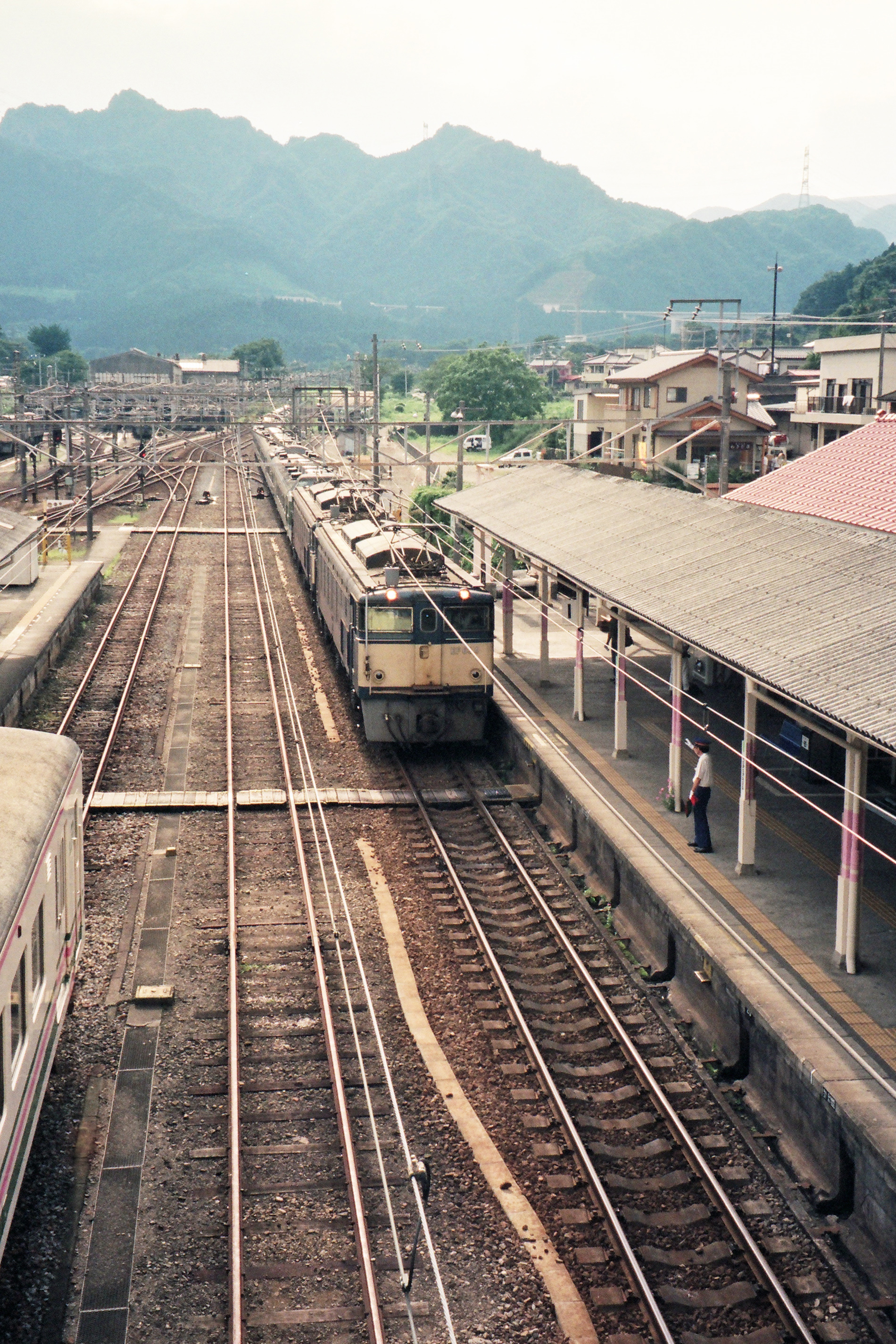 軽井沢駅から碓氷峠を下ってきて横川駅に進入する列車（1997年7月撮影）